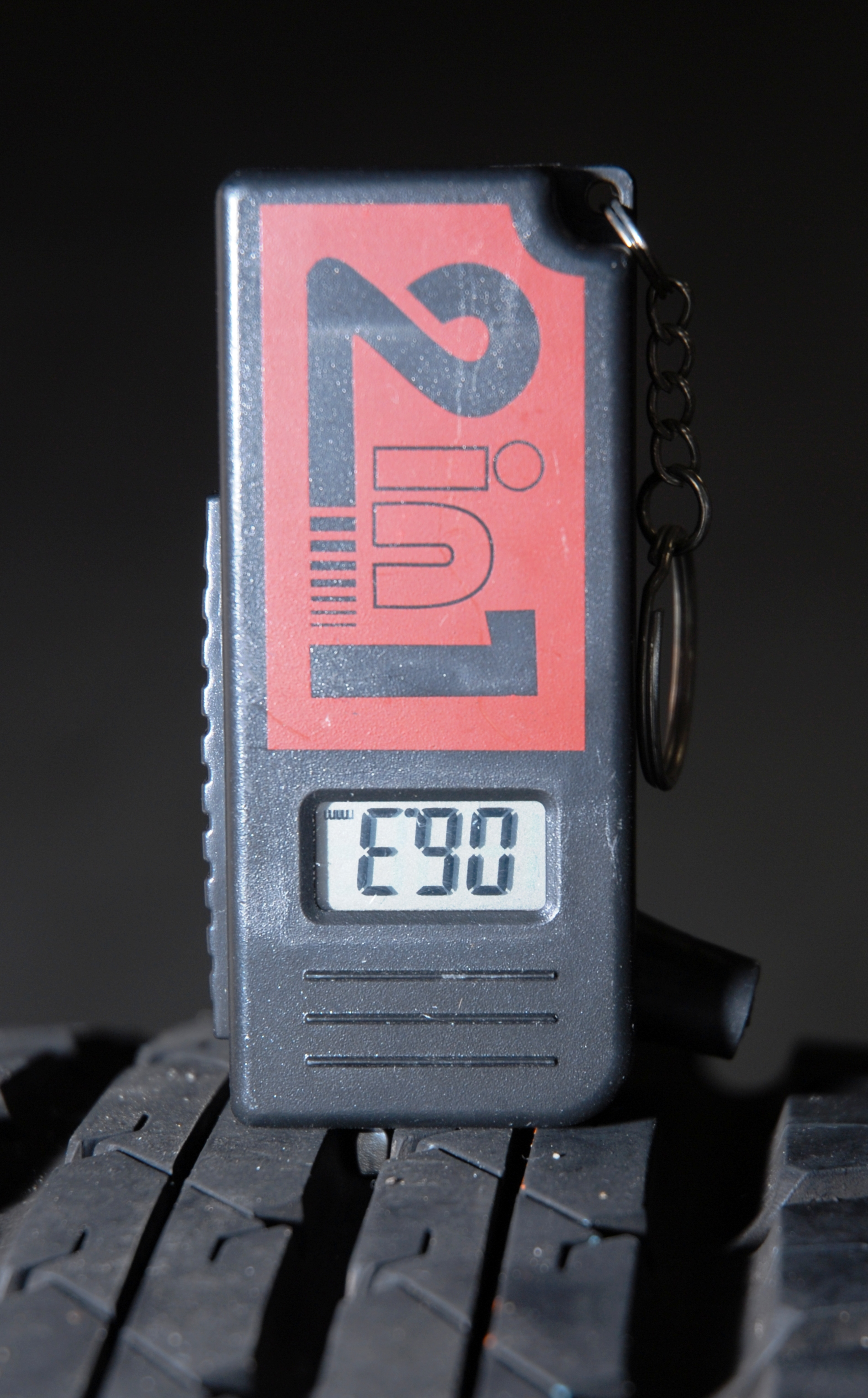 Profiltiefen- und Luftdruckmessgerät